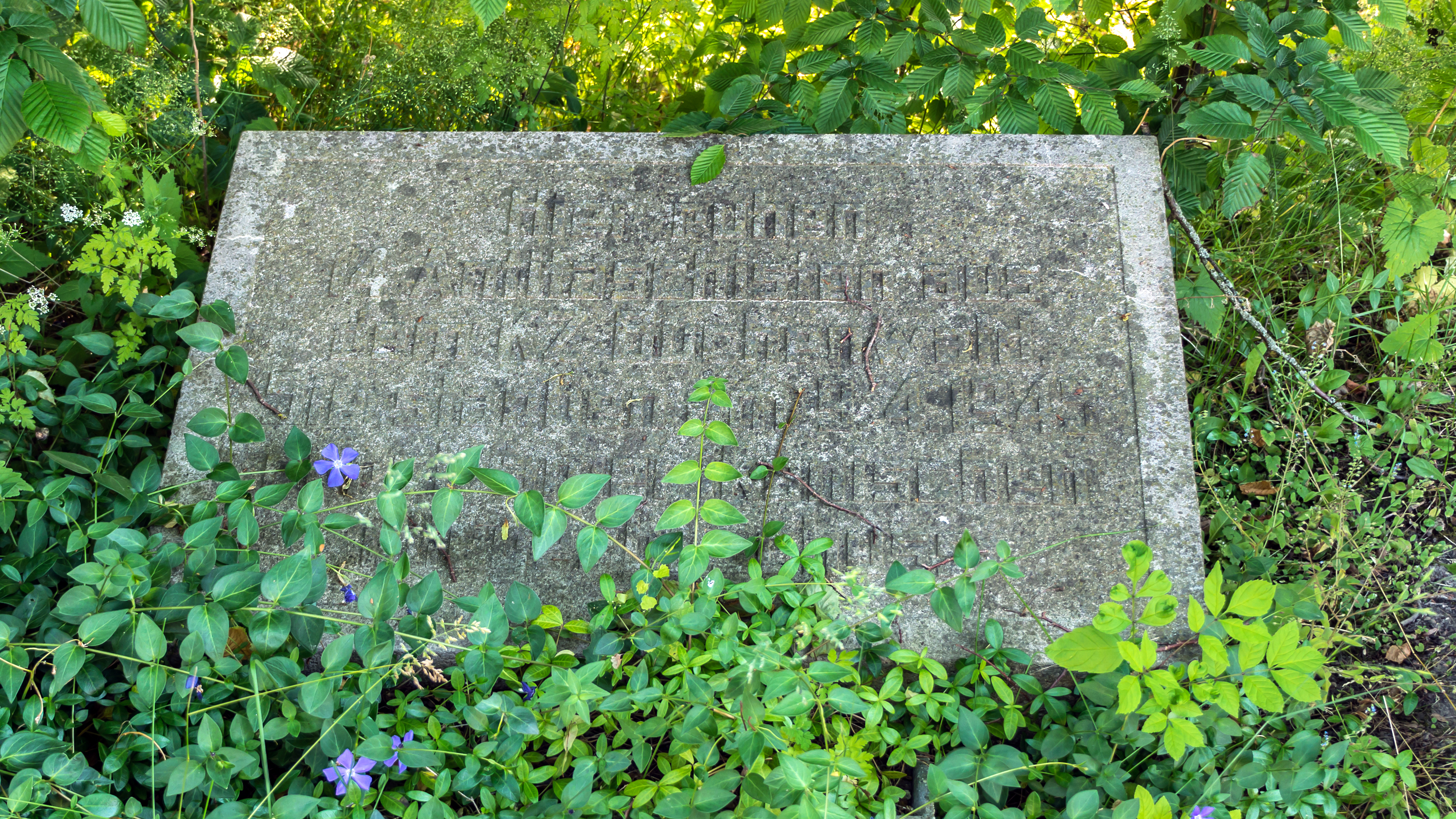 Denkmalgeschützte Grabstätte für 14 KZ-Häftlinge am Dorfanger in Teichröda, Ortsteil von Remda-Teichel